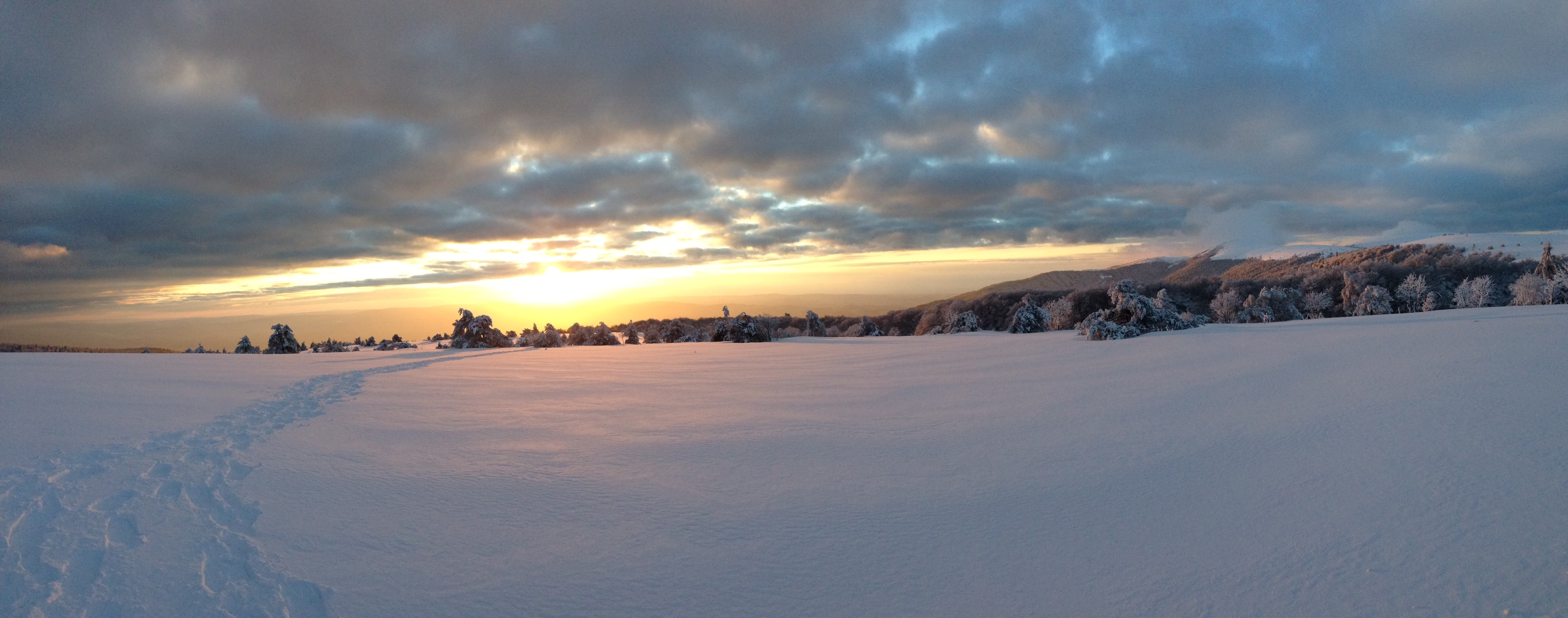 Coucher de soleil début mars sur les Hautes-Chaumes.